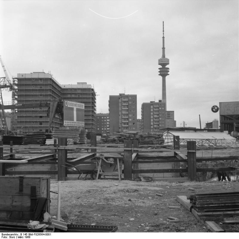 München: Baustellen vor dem Fernsehturm + U-Bahn-Bau